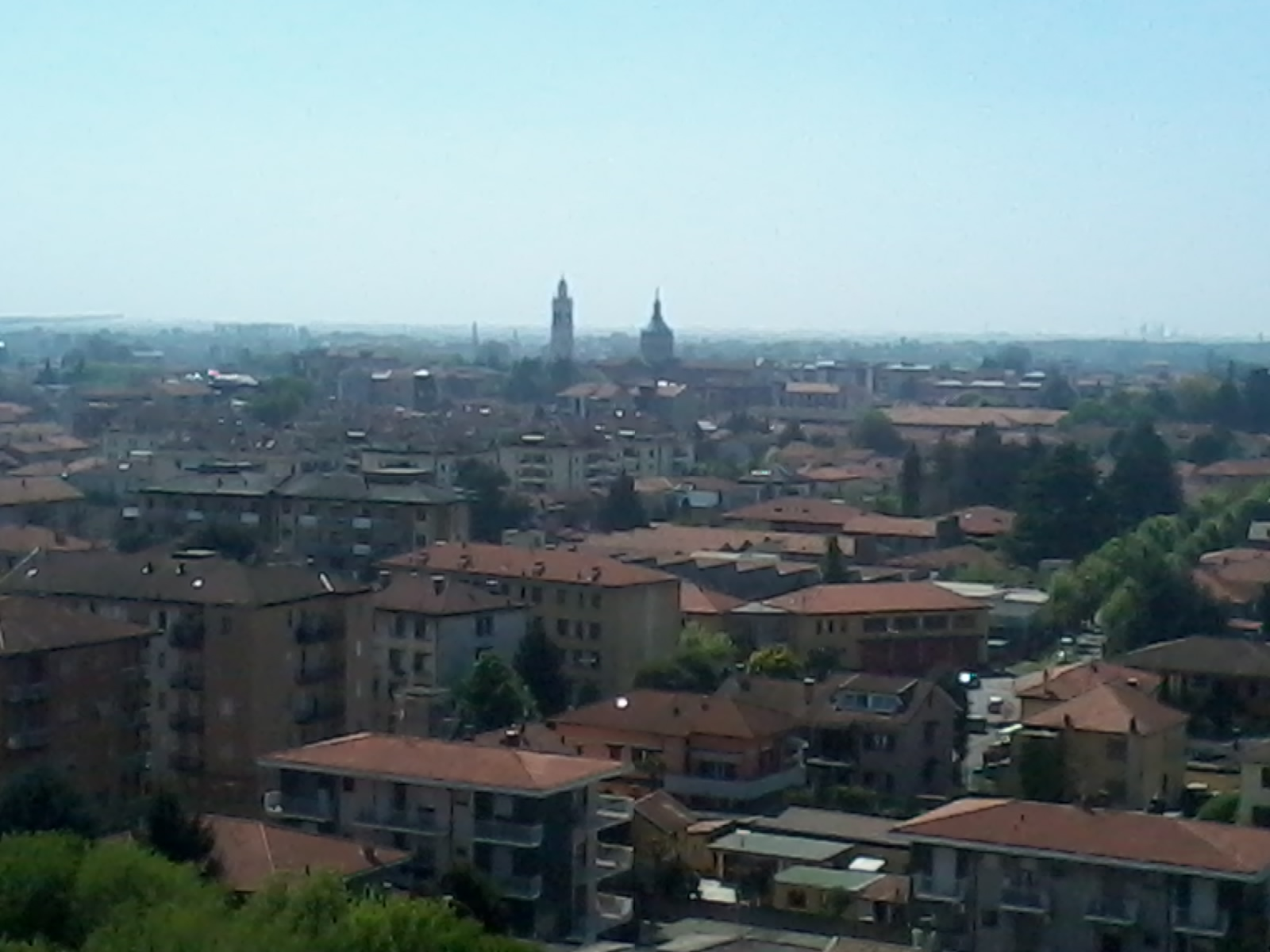 Panorama della città di Magenta (MI) - Italia